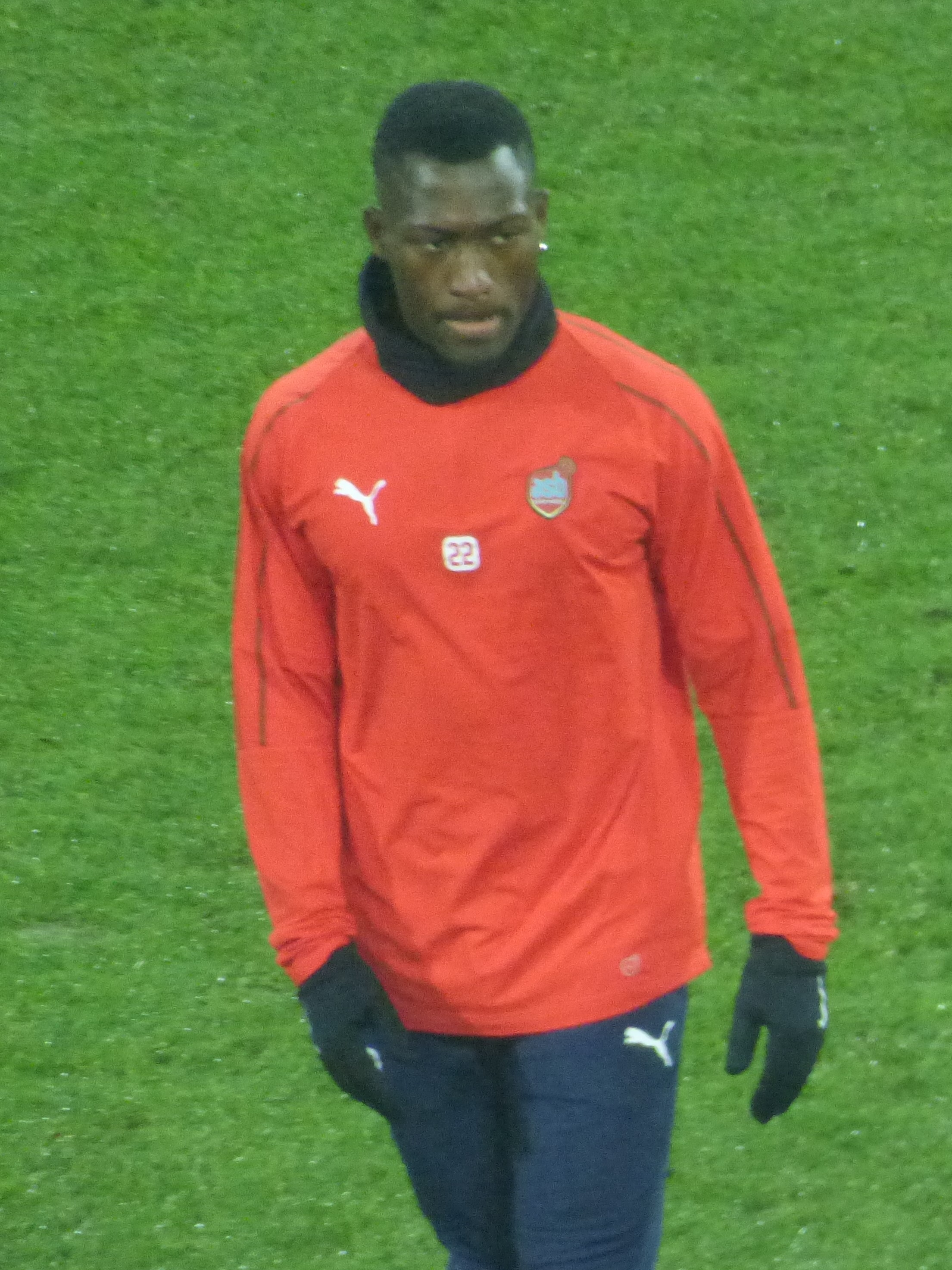 Kévin Denkey avant le match RC Lens / AS Béziers, comptant pour la 23ème journée du championnat de France de football de Ligue 2 2018-2019, le 4 février 2019, au Stade Bollaert-Delelis.